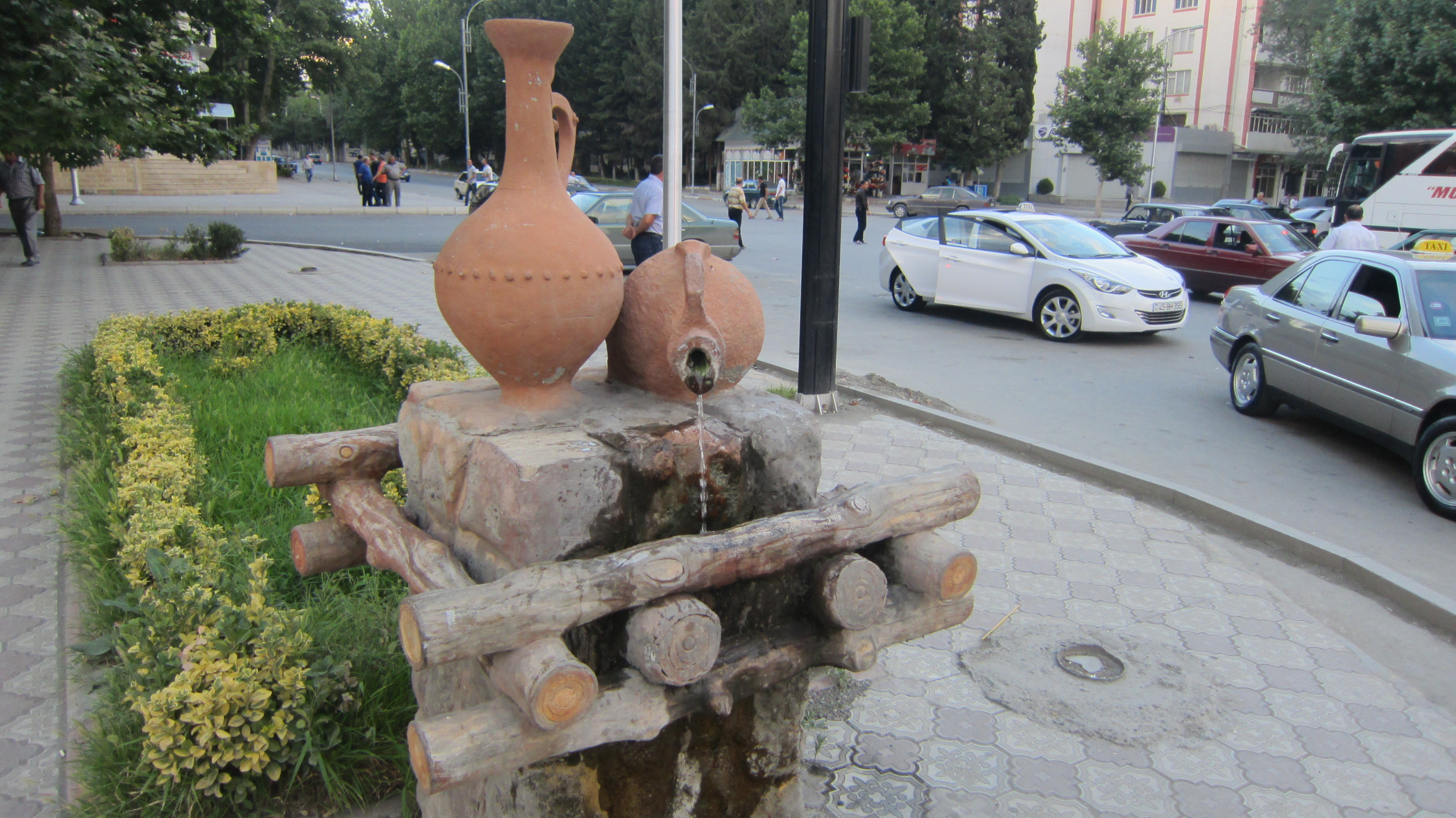 Mingəçevirdə bulaq